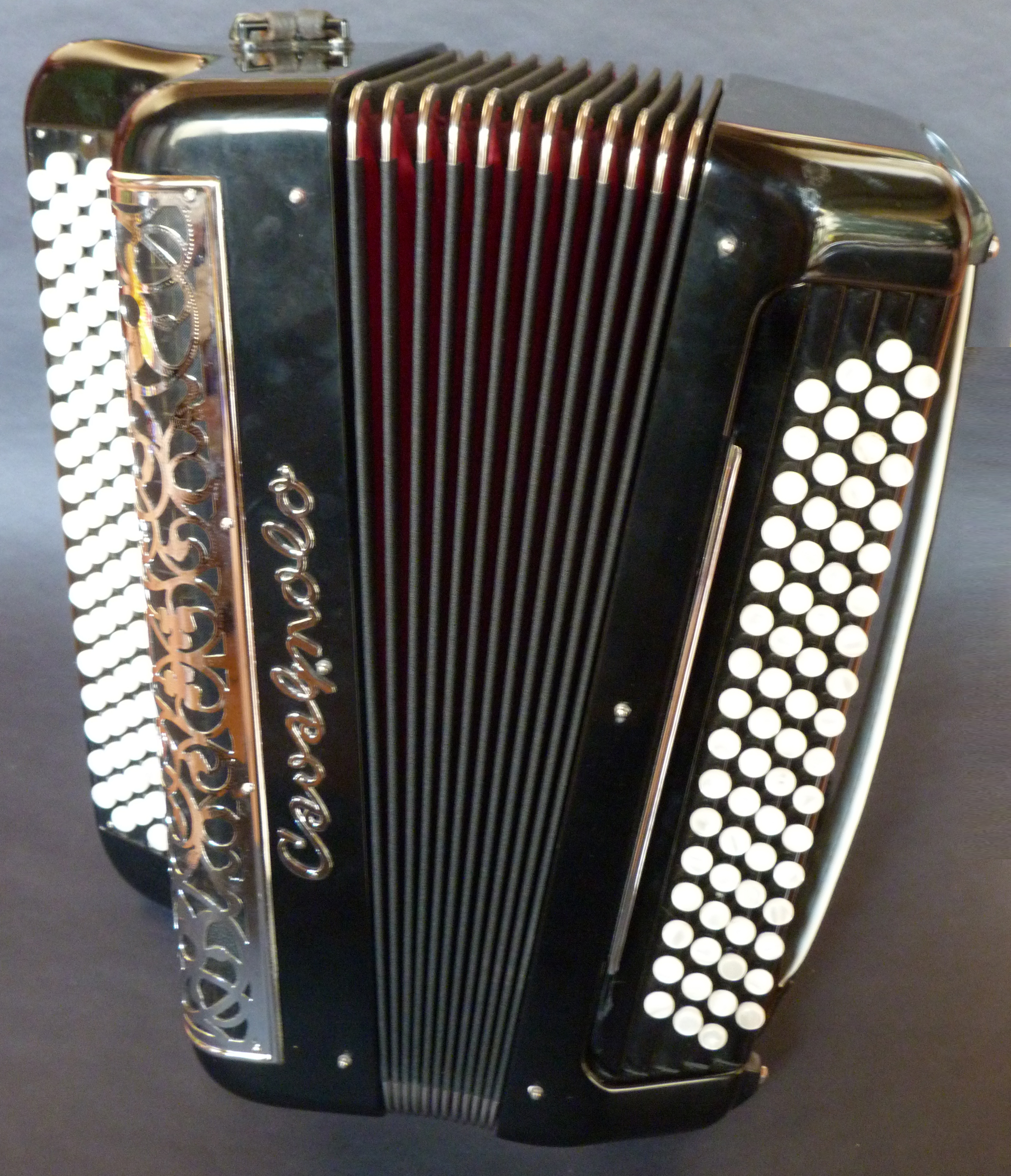 harmoneon 1985